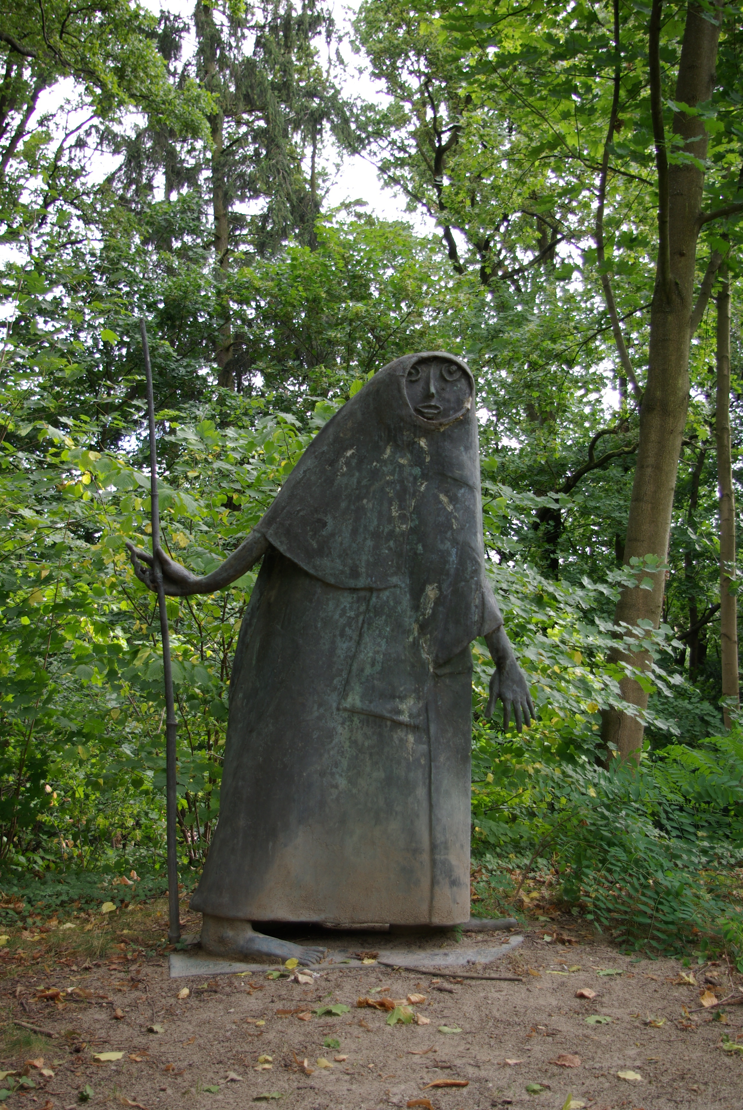 Wandernder Abraham (1957), Bronzeskulptur von Heinrich Kirchner im Burgberggarten in Erlangen